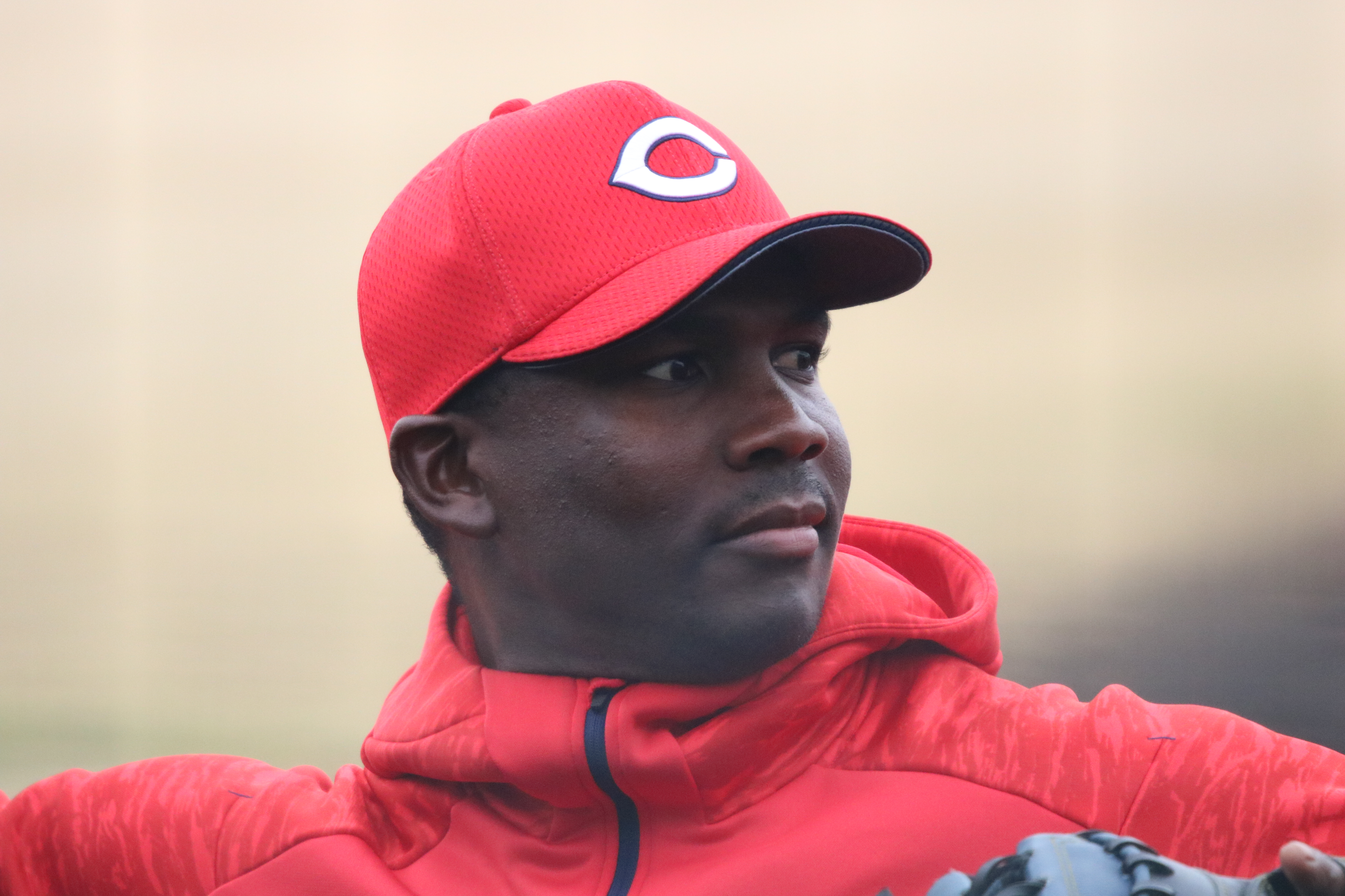 2018年3月3日